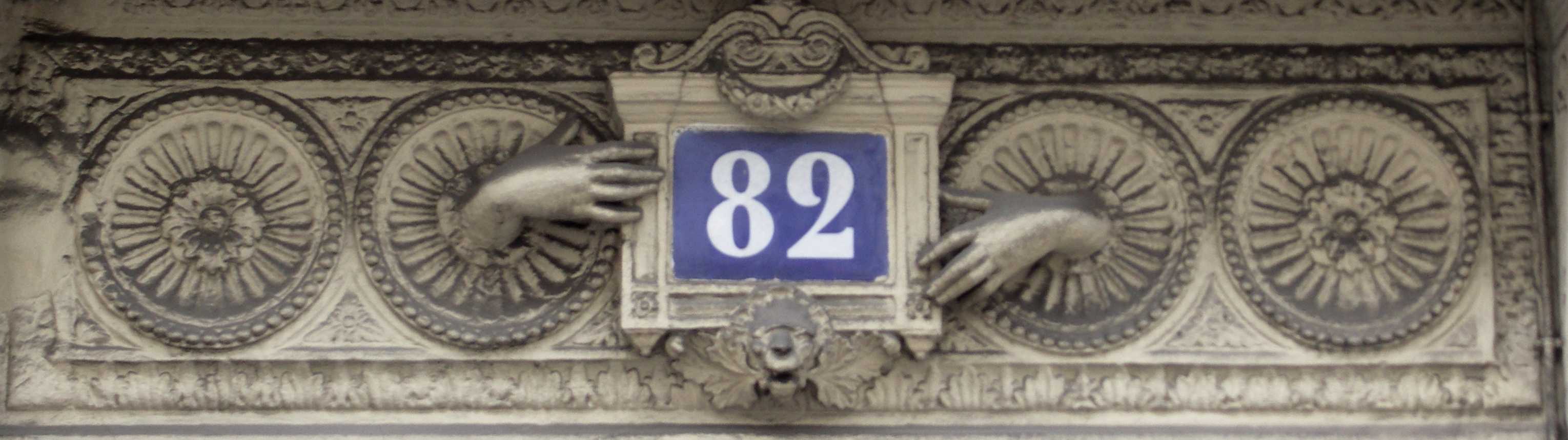 Plaque de numéro d'immeuble, 82 rue Blanche, Paris 9e. Première moitié du 19e siècle.